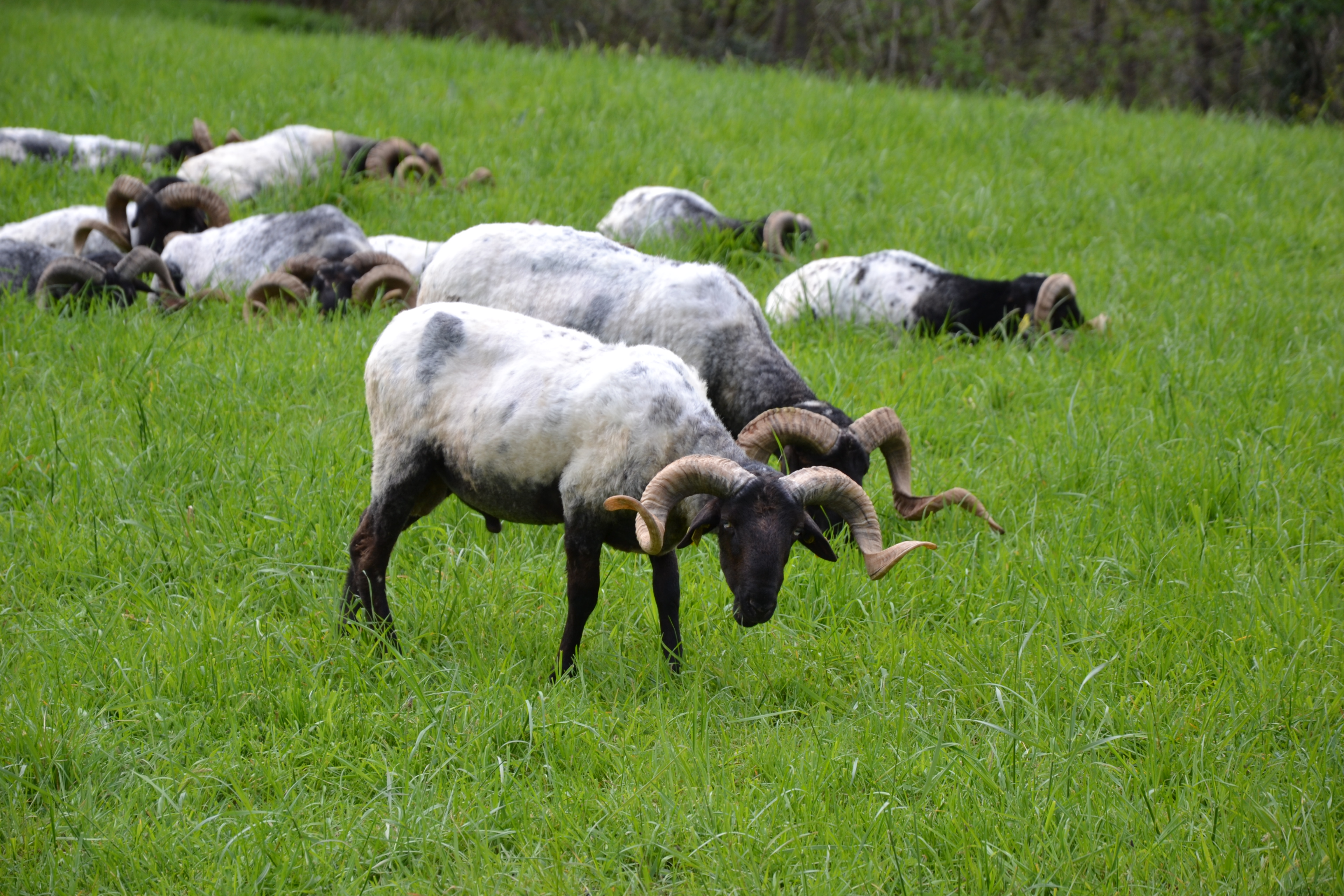 troupeau de brebis à Uhart-Cize, dans l'appellation Ossau-Iraty